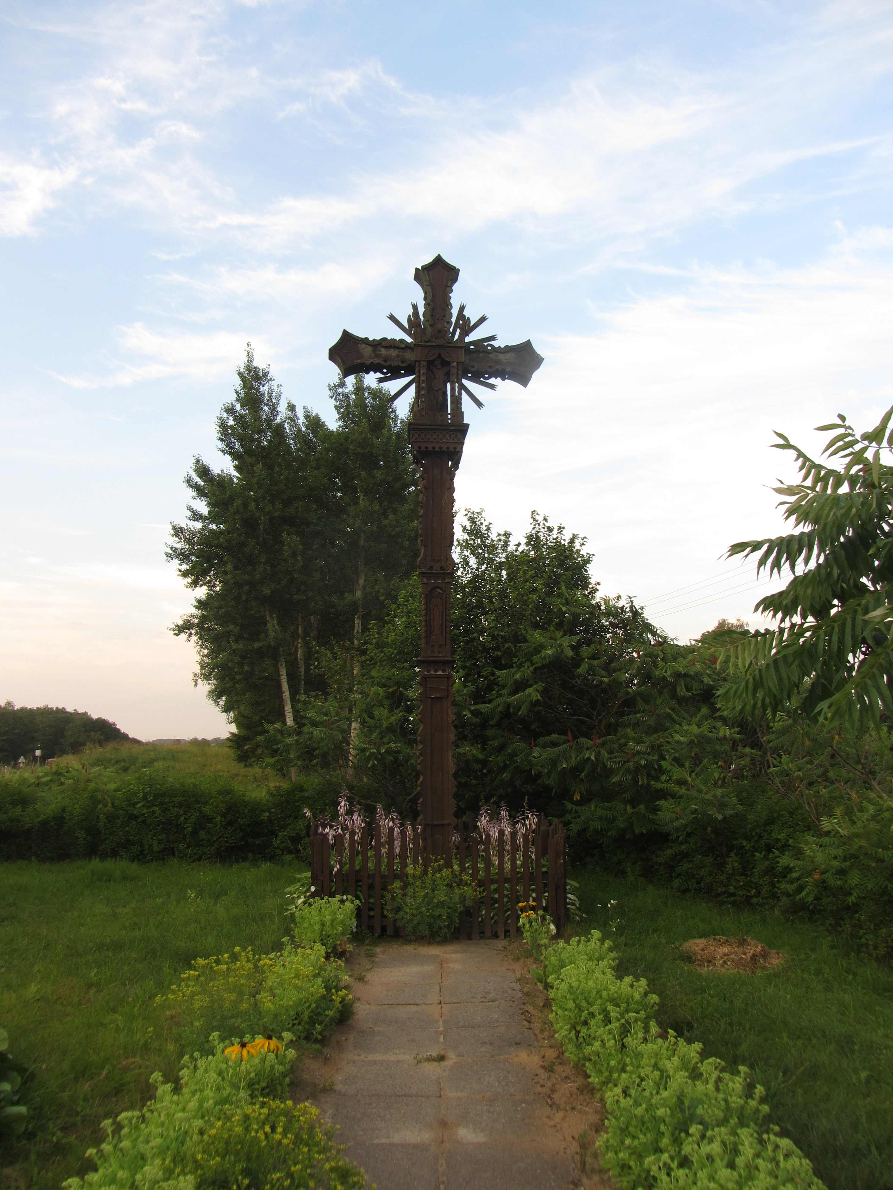 Utenos sen., Lithuania